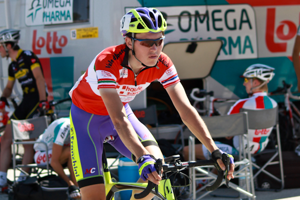 Kanstantin Klimiankou